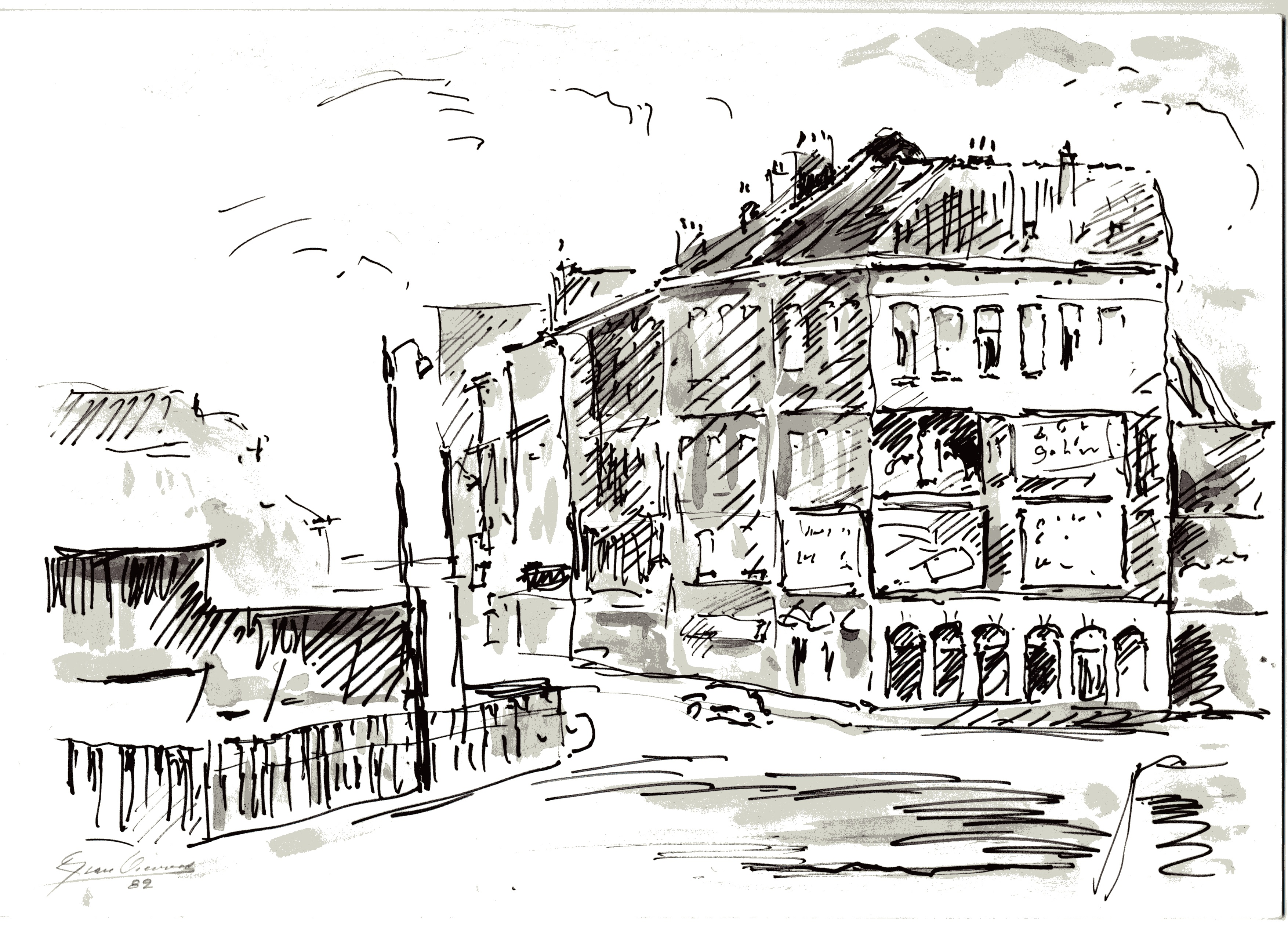 Dessin à l'encre de la Place Jourdan à Bruxelles, le 12 février 1982, oeuvre de Léon van Dievoet (1907-1993)